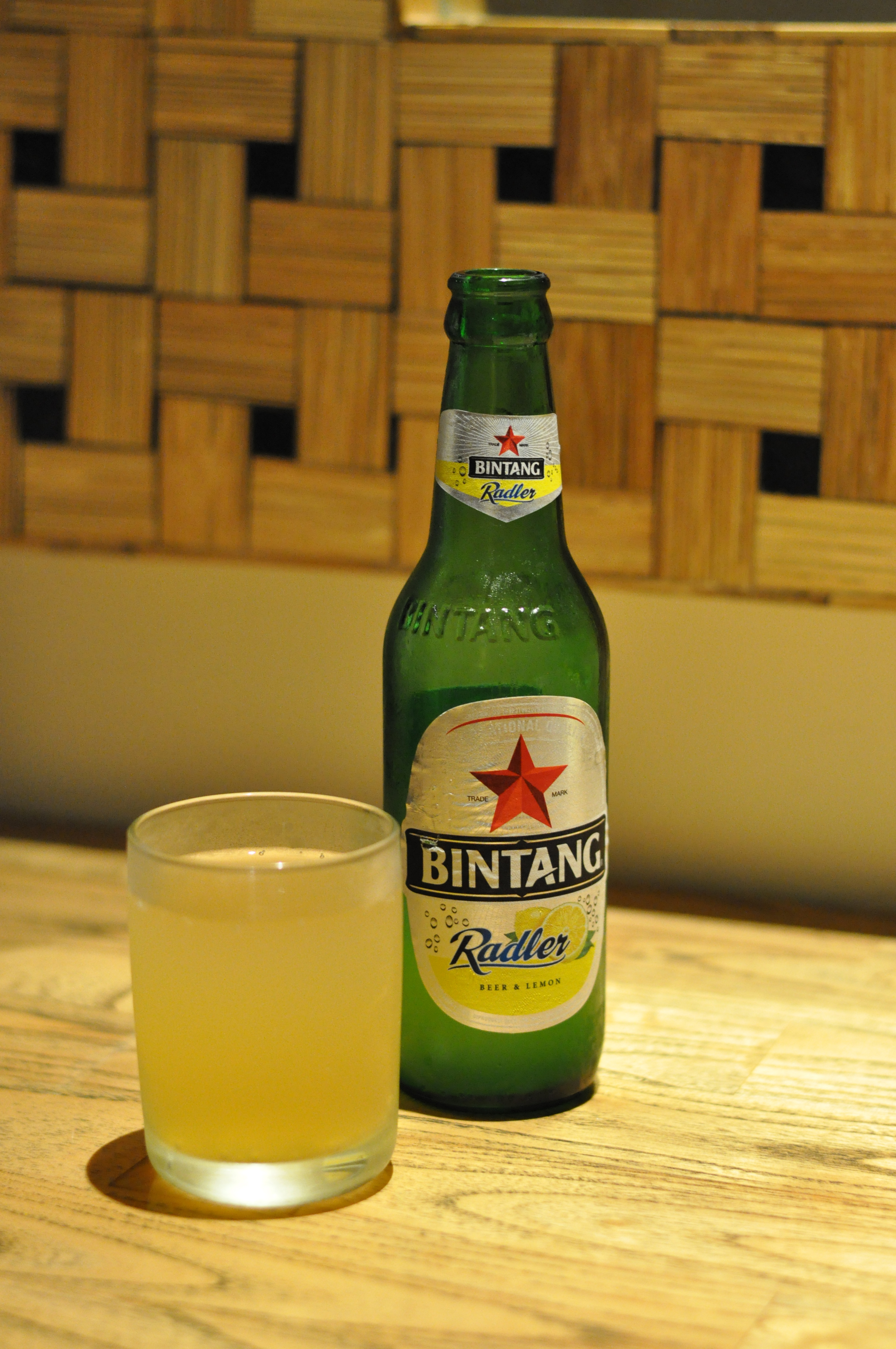 レモン風味のビンタンビール